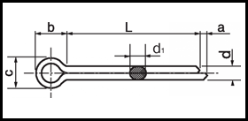 ISO 1234